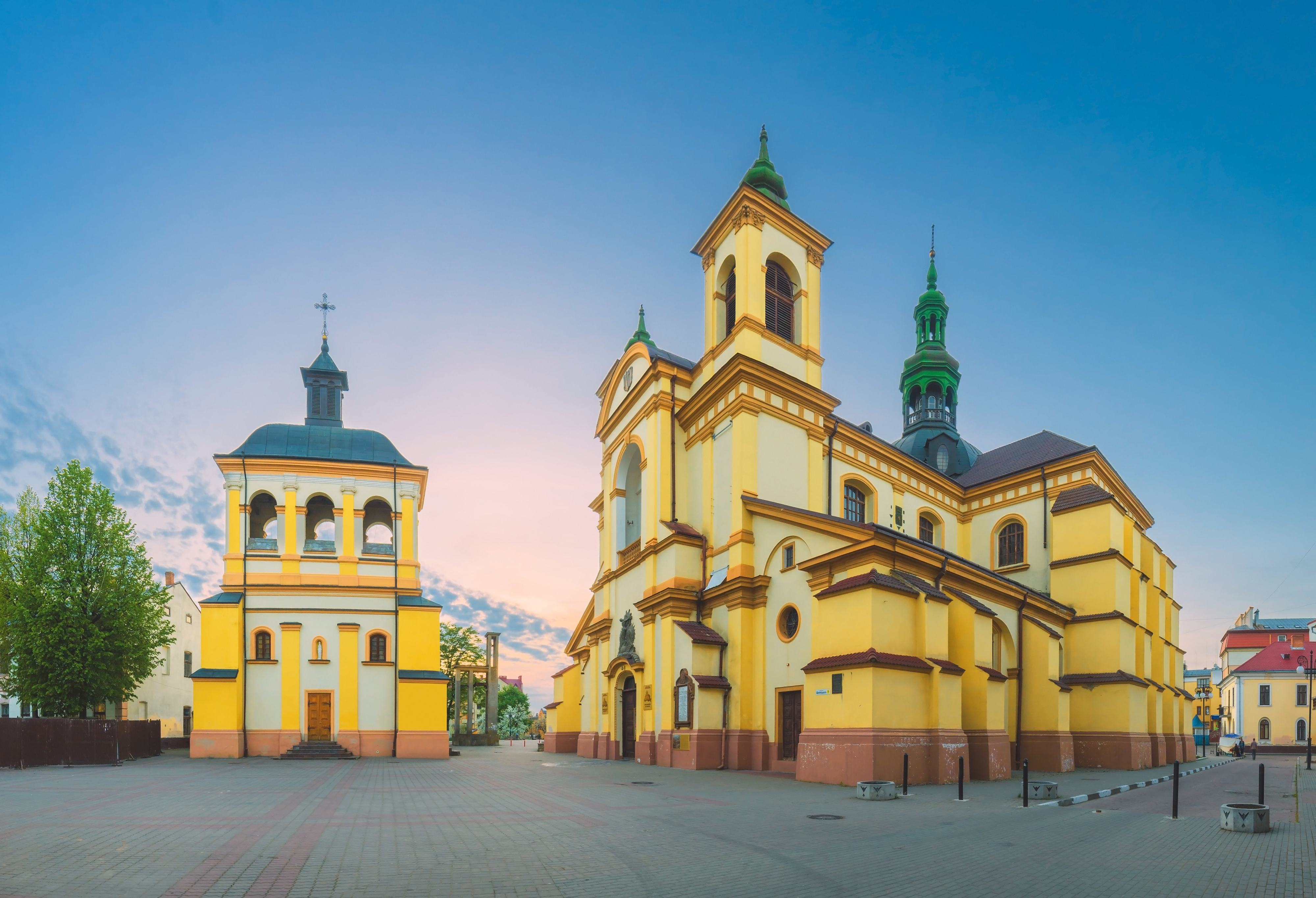 Колегіальний костел Пресвятої Діви Марії (Станіславівська колегіата), Івано-Франківськ, Майдан Шептицького, 8